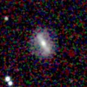 Galaxy NGC 5164